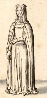 relevés fait pour le collectionneur Roger de Gaignières.